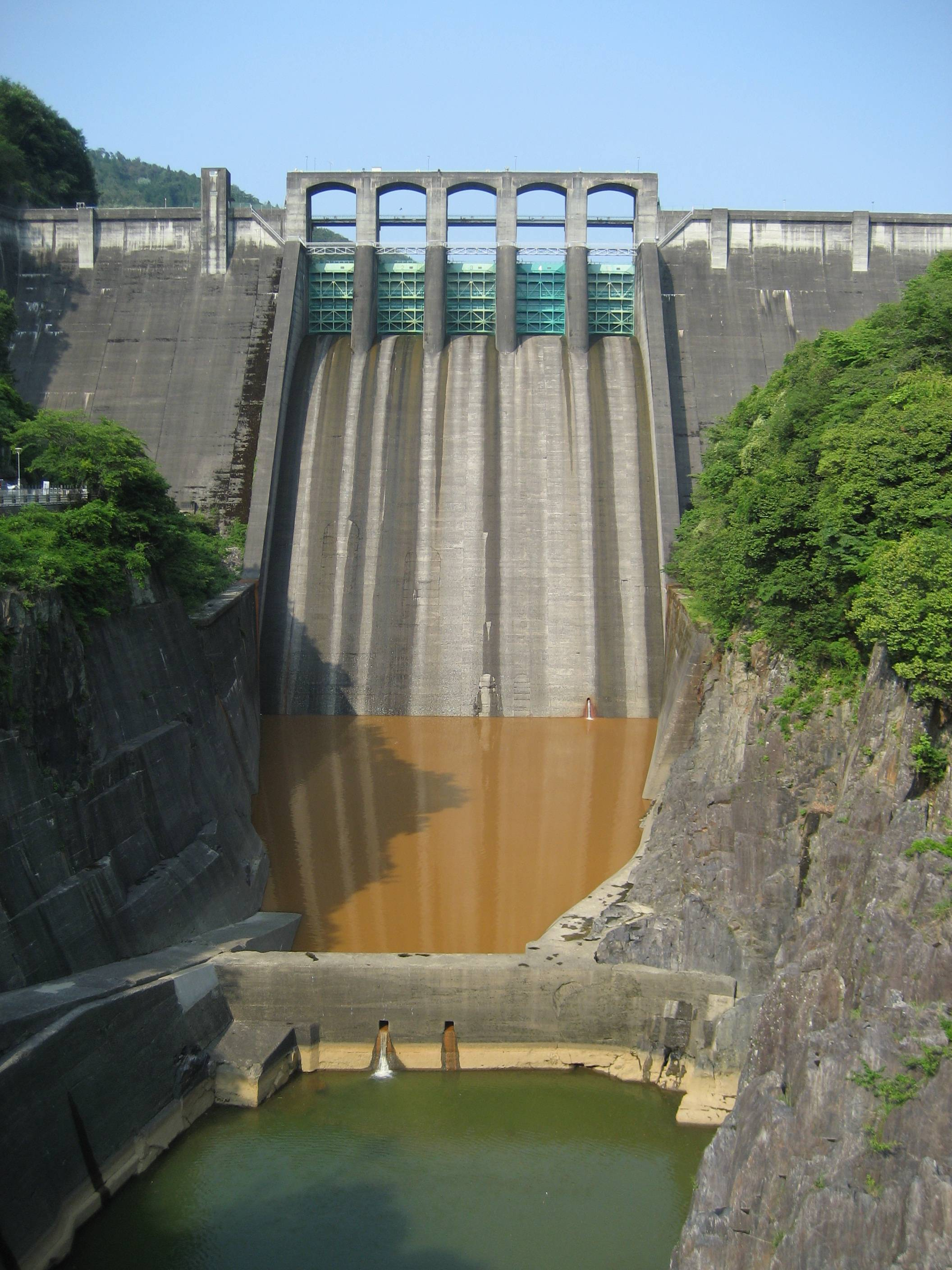 Maruyama Dam (丸山ダム).